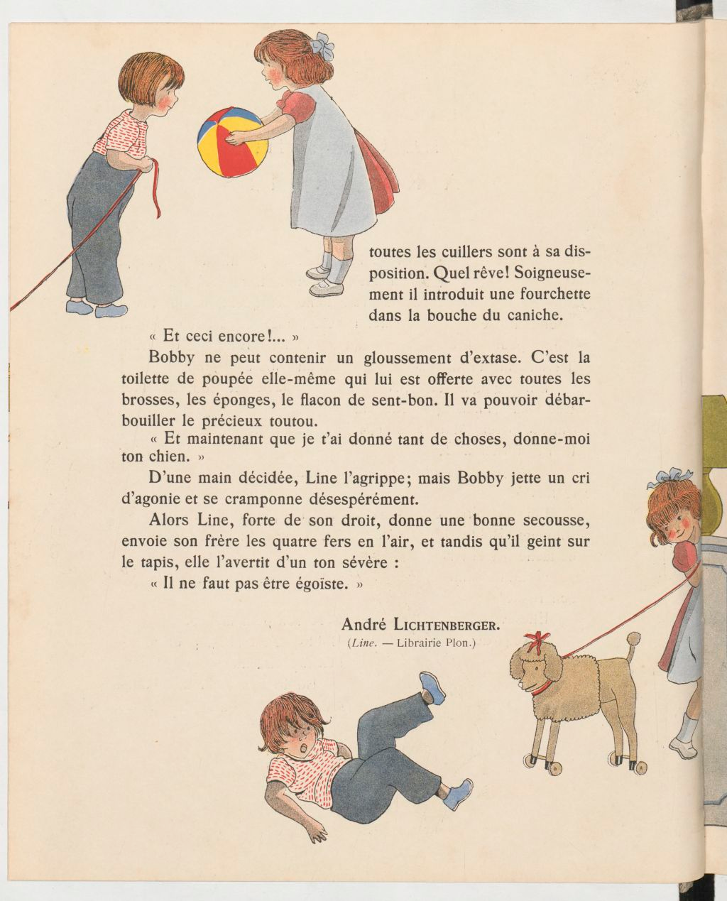 Contes et images, illustrations Marie-Madeleine Franc-Nohain : Le caniche à roulettes, par André Lichtenberger.